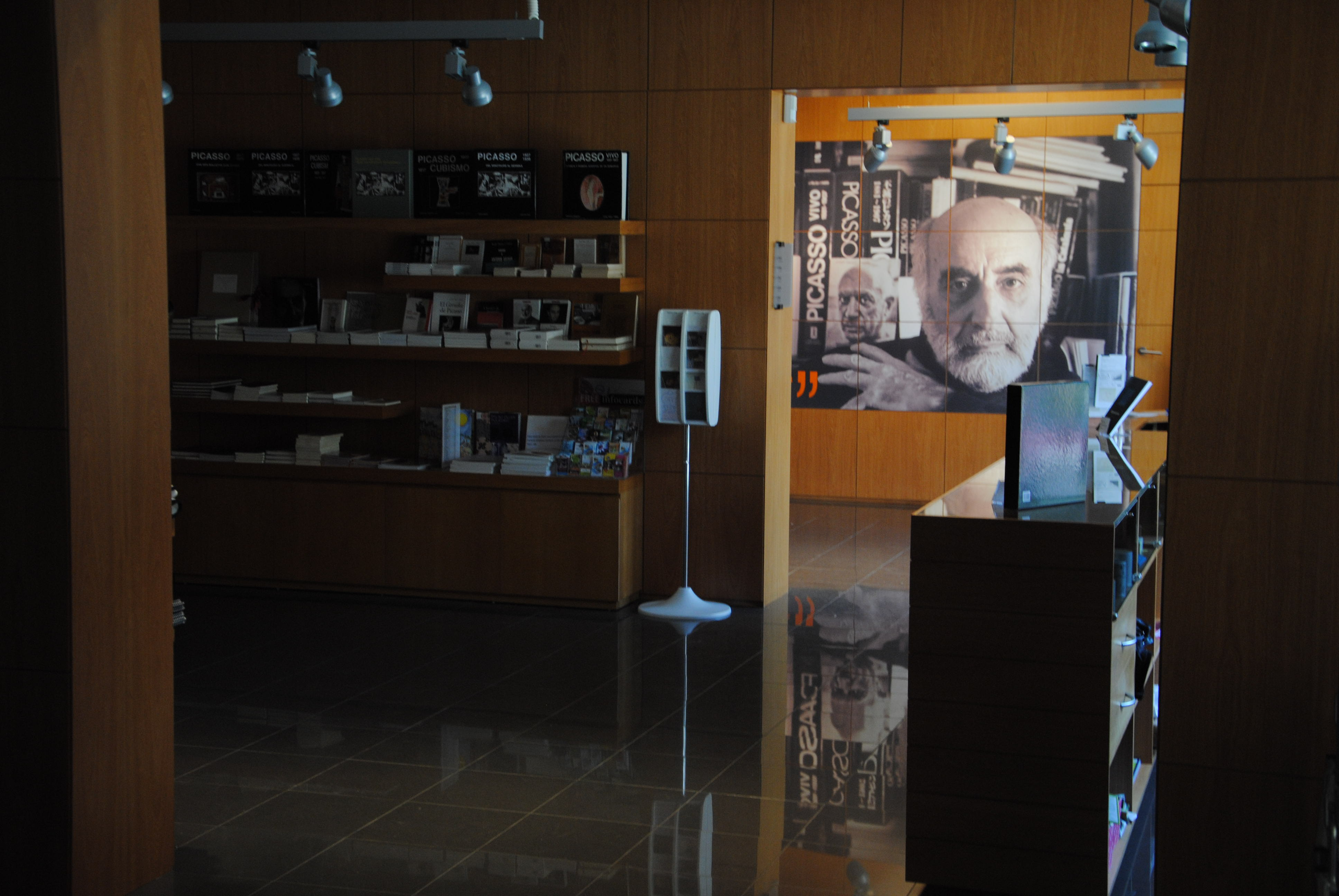 Vestíbul de la Fundació Palau